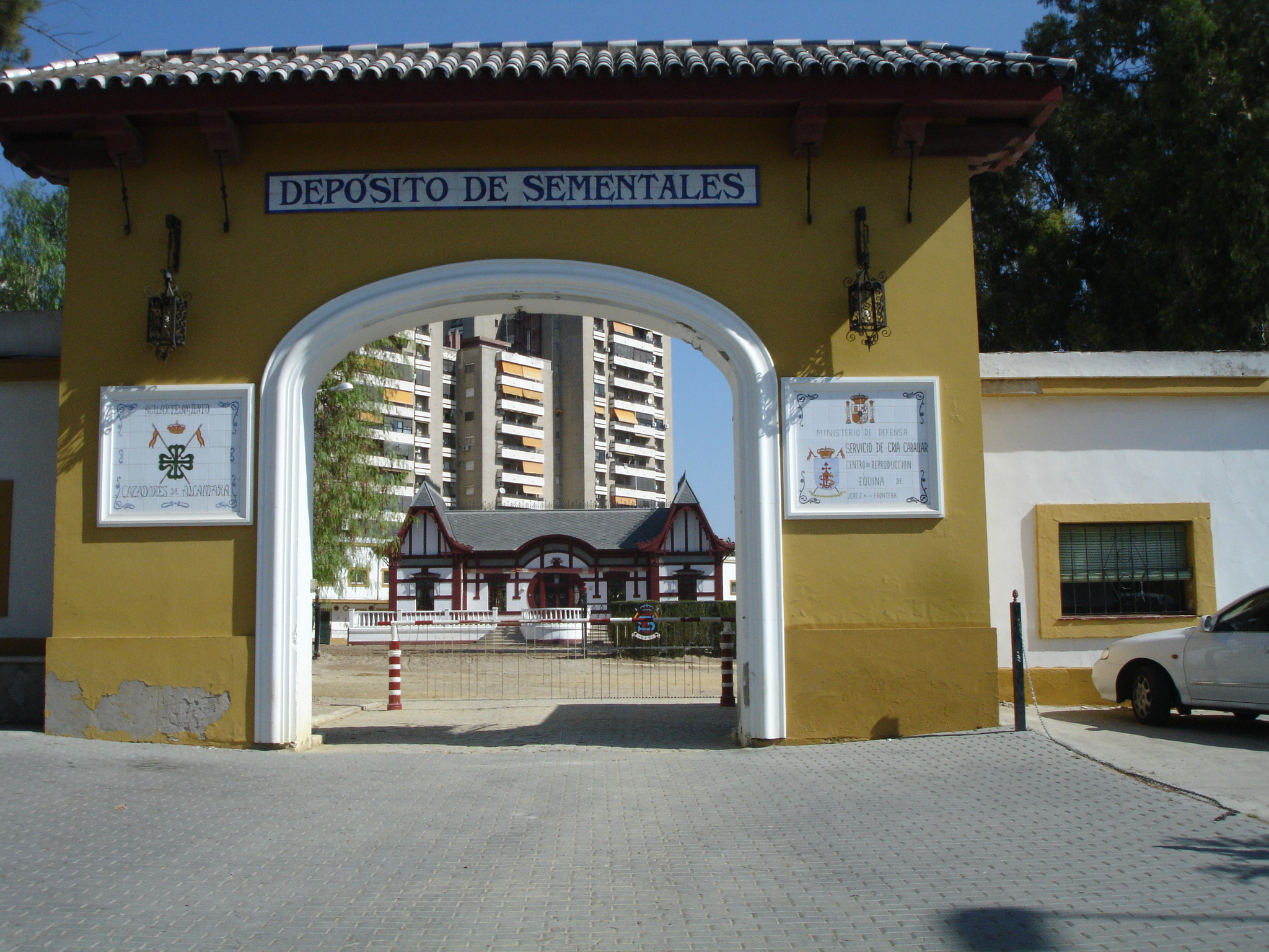 Sementales militar horse farm. Jerez de la Frontera (Andalusia, Spain)